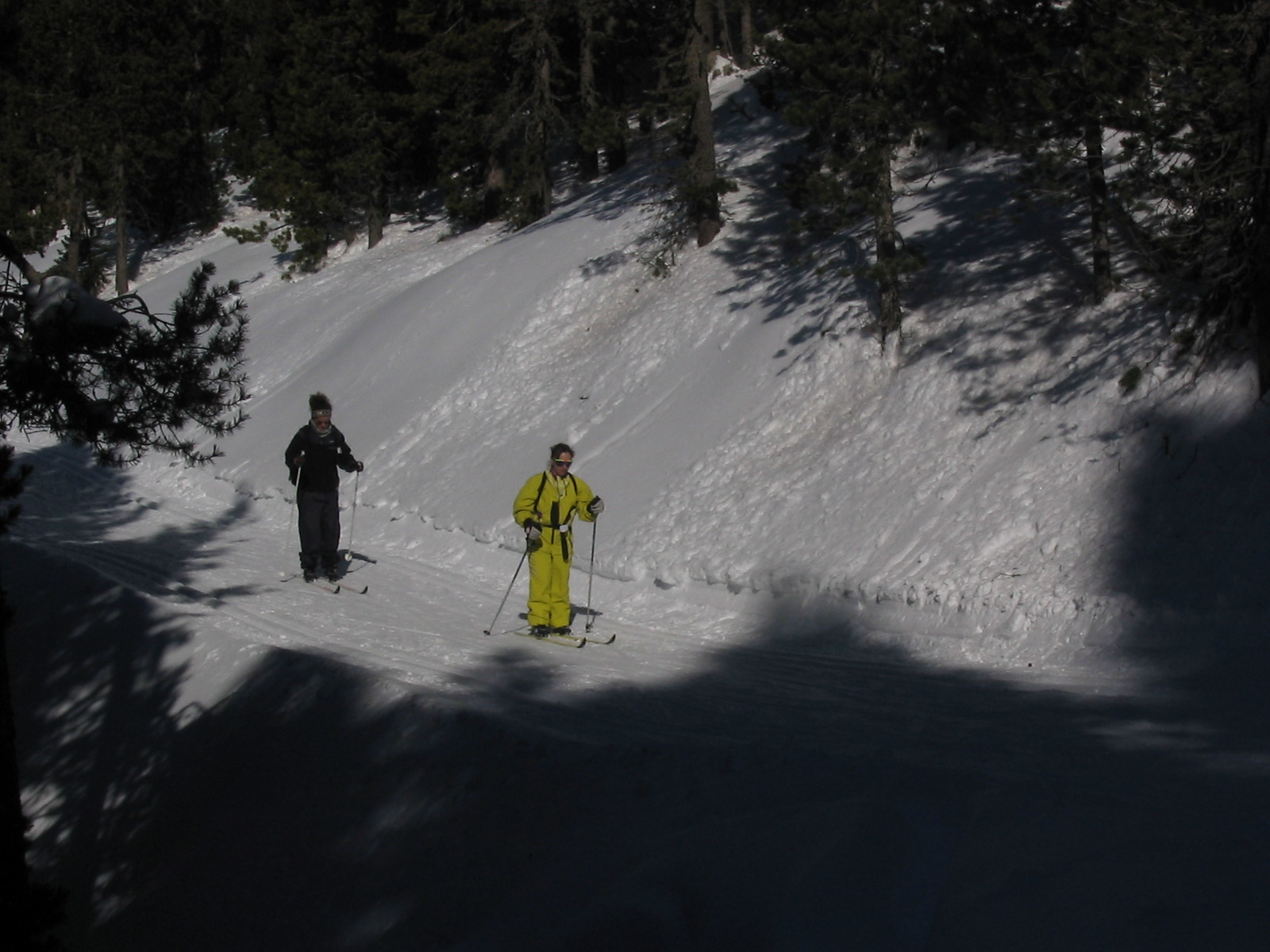 Pistes d'esquí nordic de Tuixén